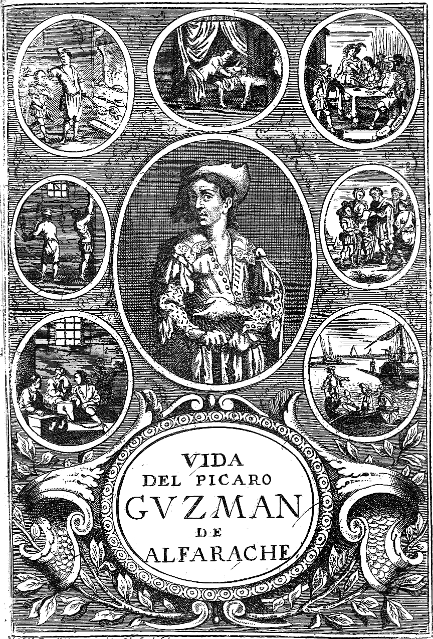 Grabado de la portada de Vida y hechos del pícaro Guzmán de Alfarache, atalaya de la vida humana, Amberes, Jeronymo Verdussen ..., 1681